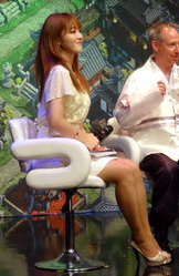 넥슨 모바일데이 Vol.3 : 도미네이션즈